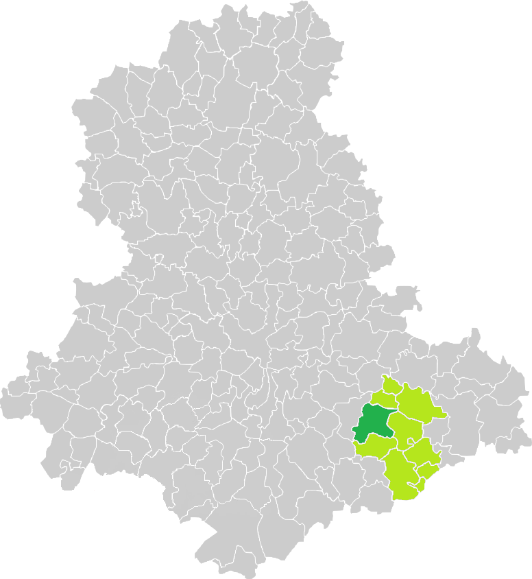 Carte de situation de la commune de Linards (en vert foncé) dans le votre Canton (en vert clair) sur une carte des communes de la Haute-Vienne